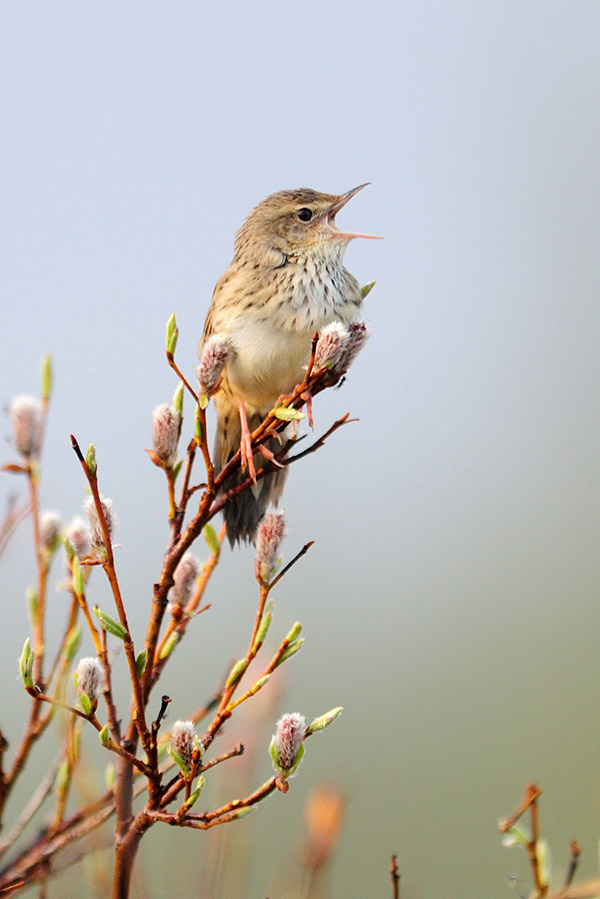 Самозабвенная песня пятнистого сверчка.